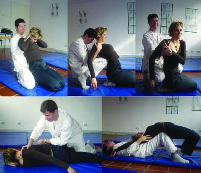 Српски (ћирилица): Yumeiho 5 grips